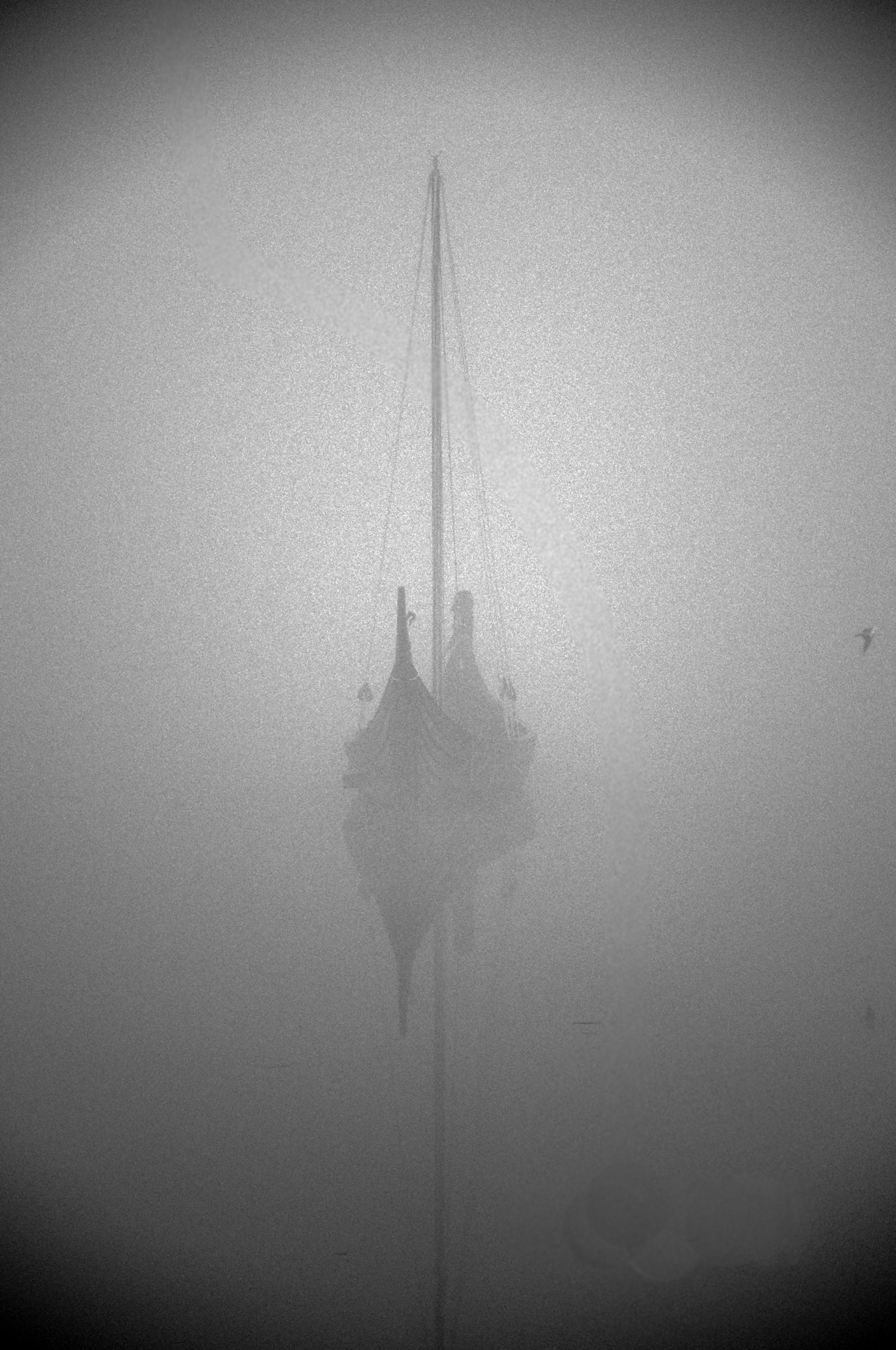 Catoira. Drakkar viquingo